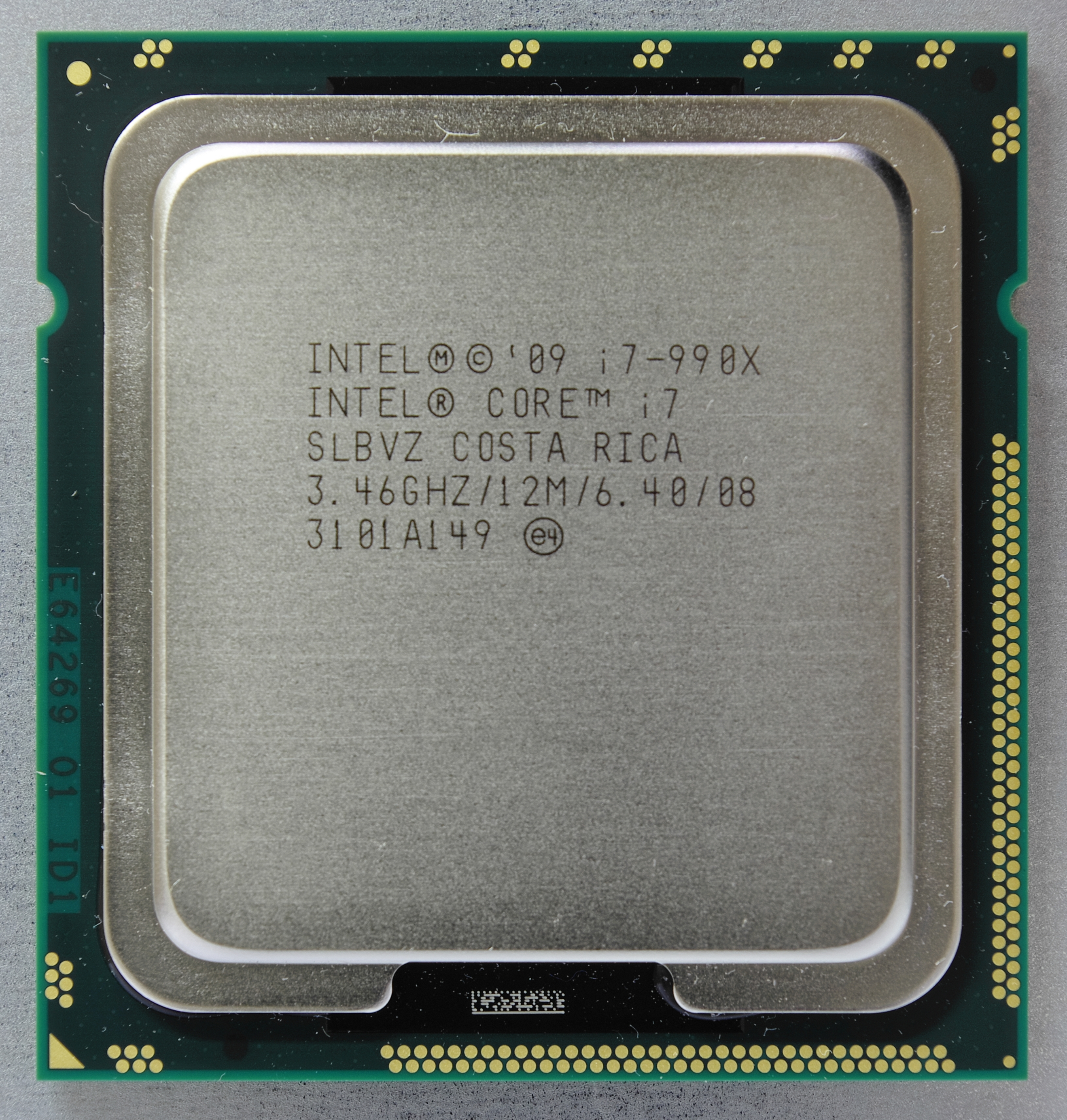 Intel Core i7 - 990X Heatspreader